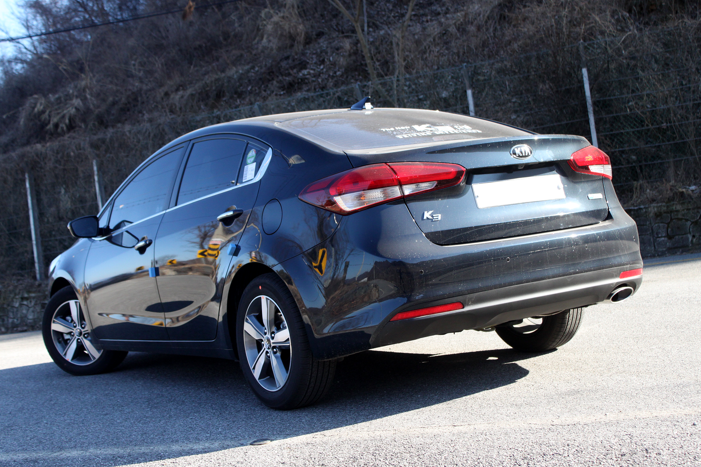 기아 더 뉴 K3 후측면